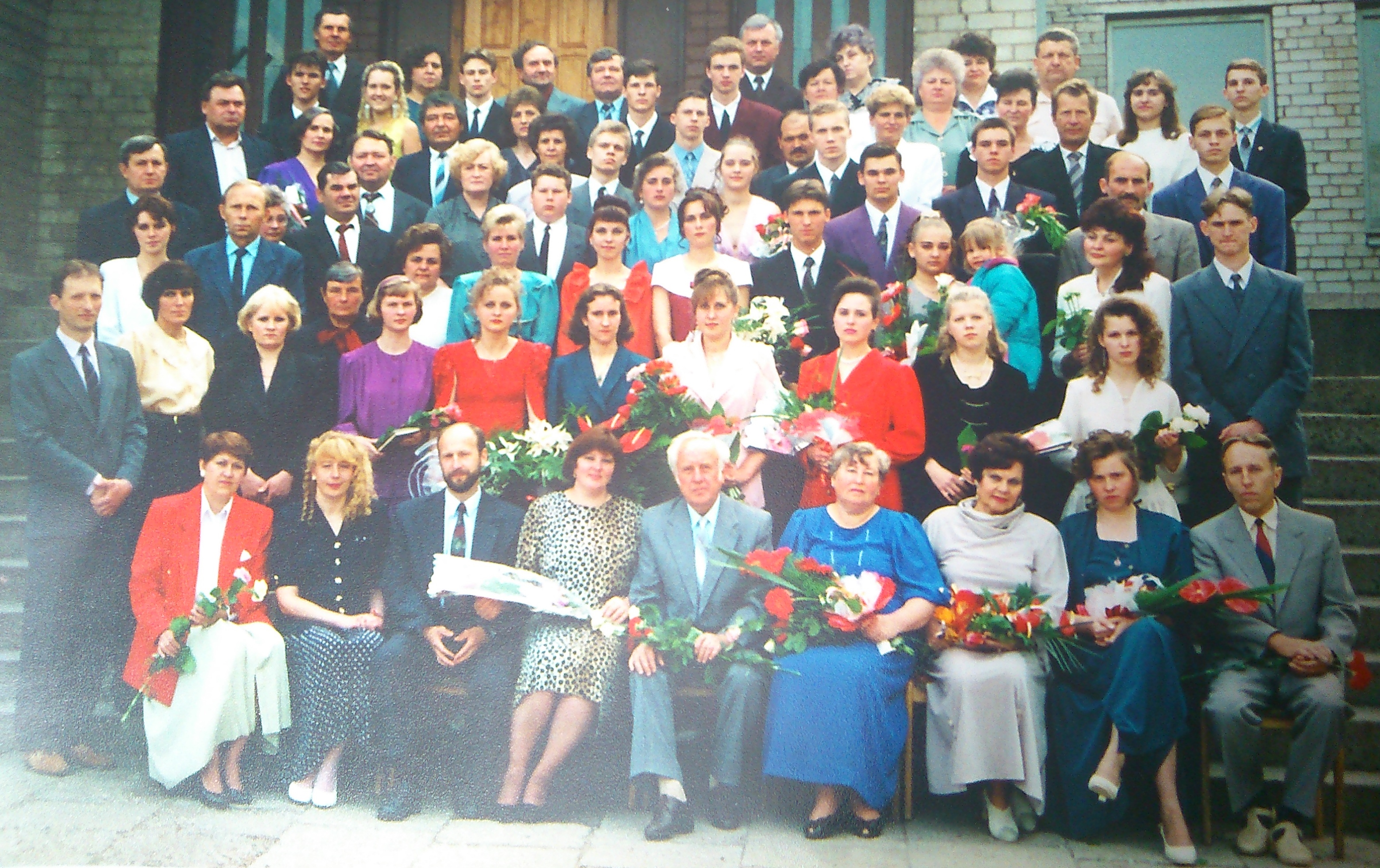 1996 m. išleistuvės, Jonavos 3 vid. m.